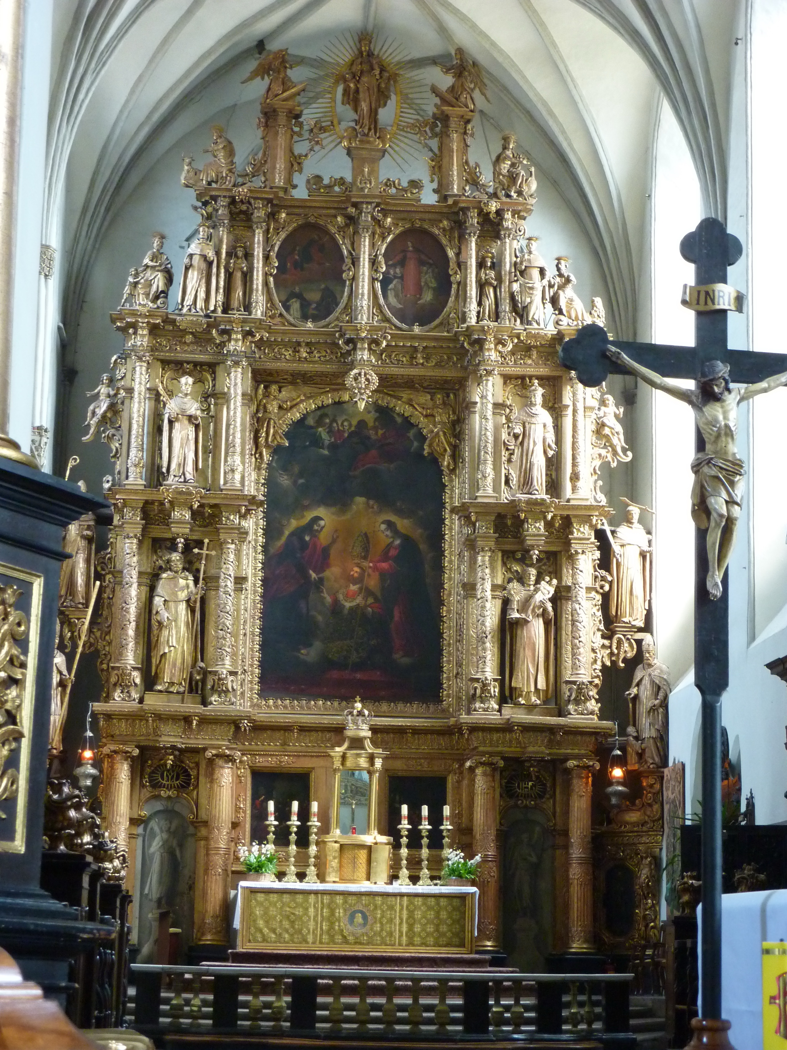 Gdańsk Główne Miasto, ul. Świętojańska 72 - wnętrze Bazyliki św. Mikołaja (późnorenesansowy ołtarz główny)